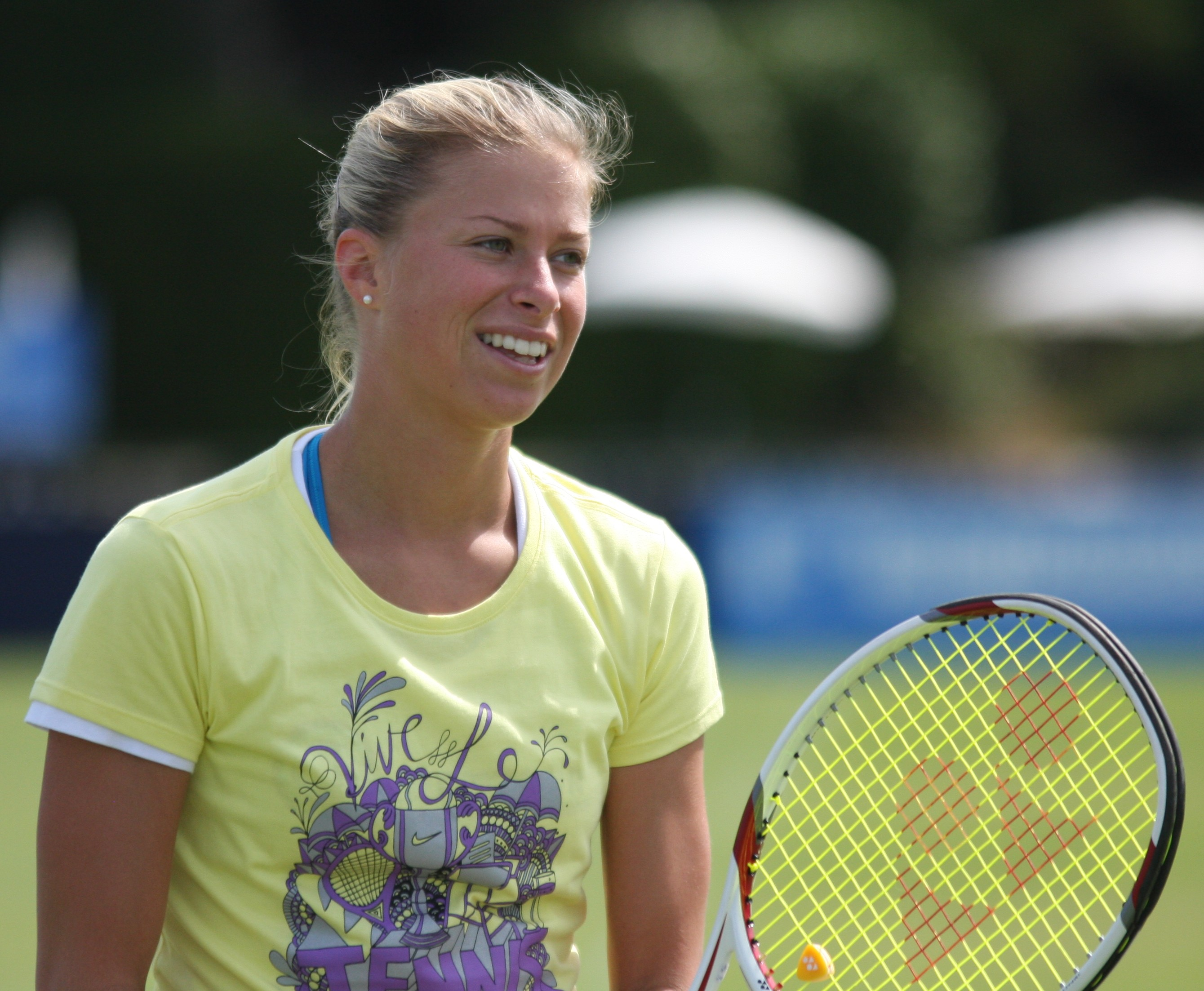 Portrait de Andrea Hlavackova à Eastbourne en 2011